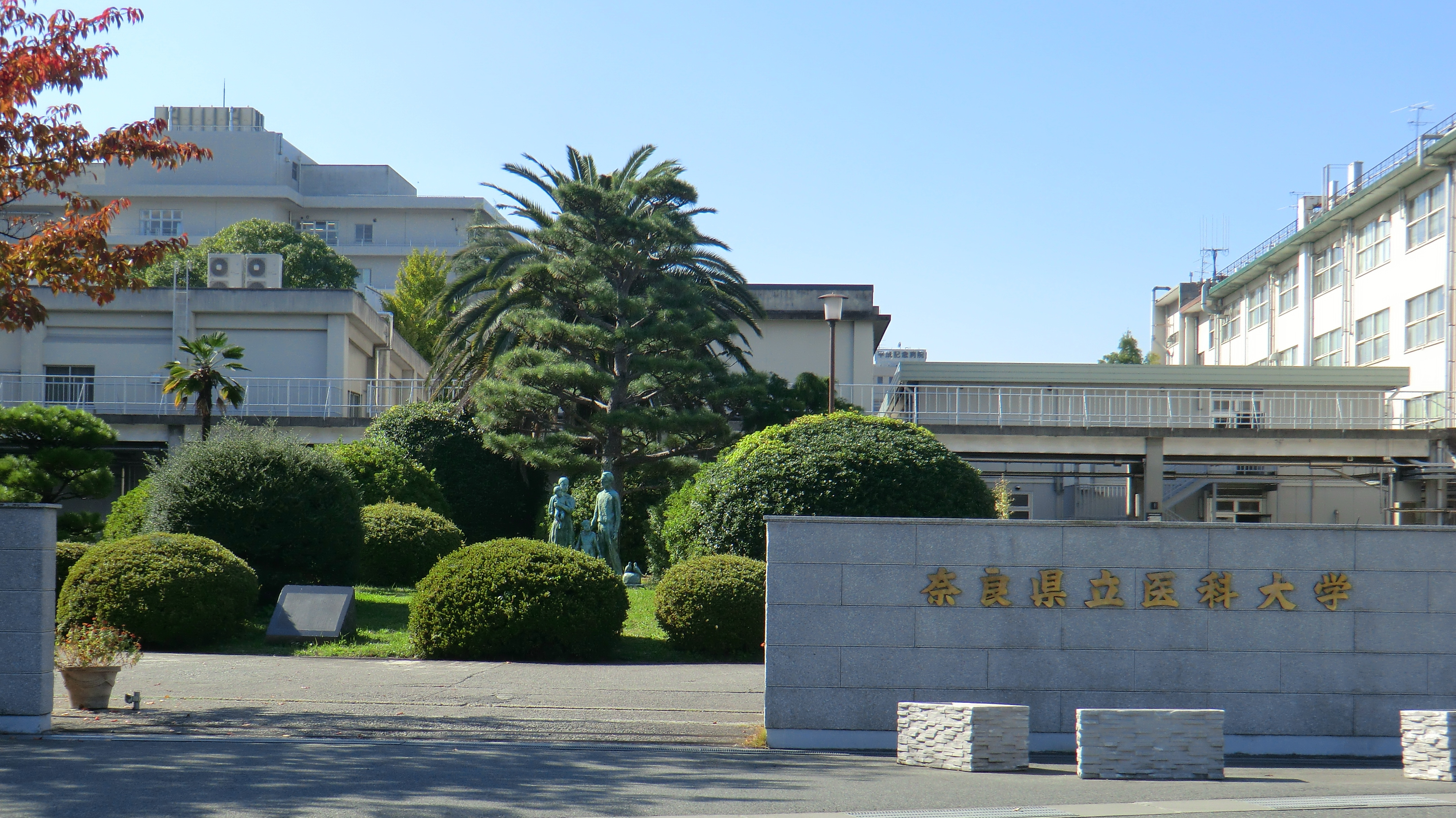 奈良県立医科大学正門（2014年10月撮影）